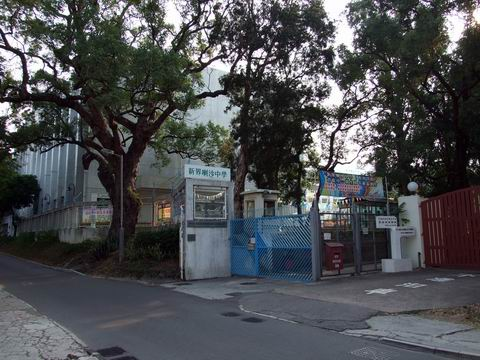 位於金錢村口的新界喇沙中學